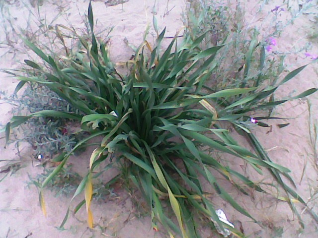 Planta perenne d'habitat a les dunes litorals.